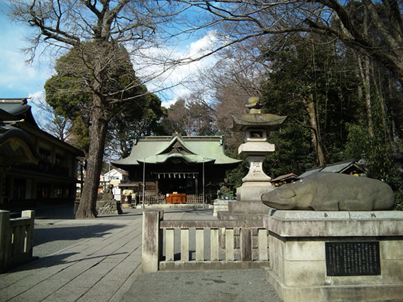 谷保天満宮拝殿遠望